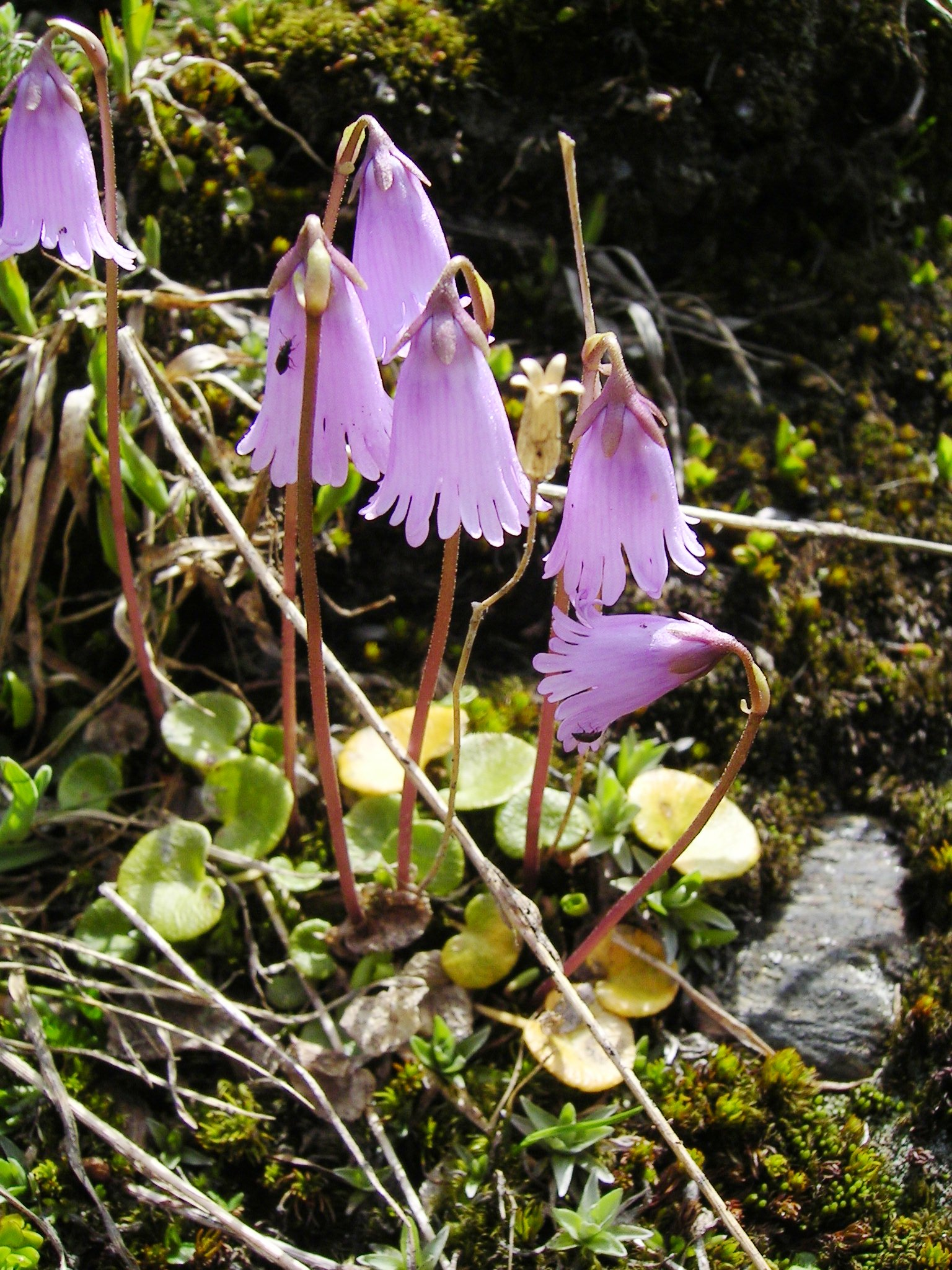 (en) Soldanella pusilla Place: Swiss Alps Editing: none (de) Zwerg-Soldanelle (Soldanella pusilla), irgendwo in den Schweizer Alpen Aufnahmeort: Schweiz Bearbeitung: keine